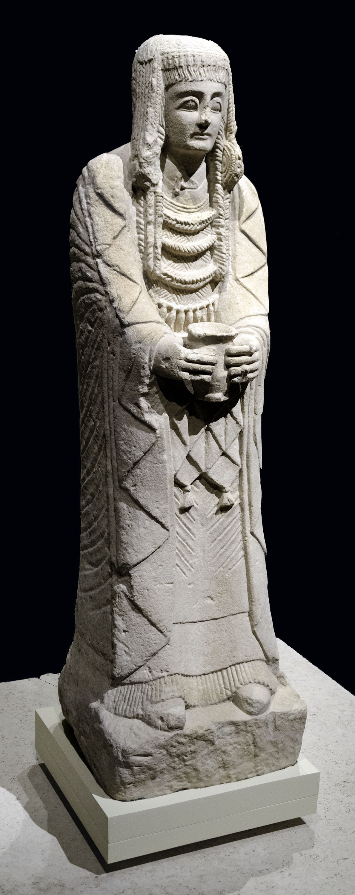 La tercera dama ibérica (con permiso de la de Elche y la de Baza) se encontró a mediados del siglo XIX en un santuario ibérico en el Cerro de los Santos, Montealegre del Castillo, Albacete. Está tallada en caliza, mide unos 135 cm de altura y está datada en el siglo III a.C.